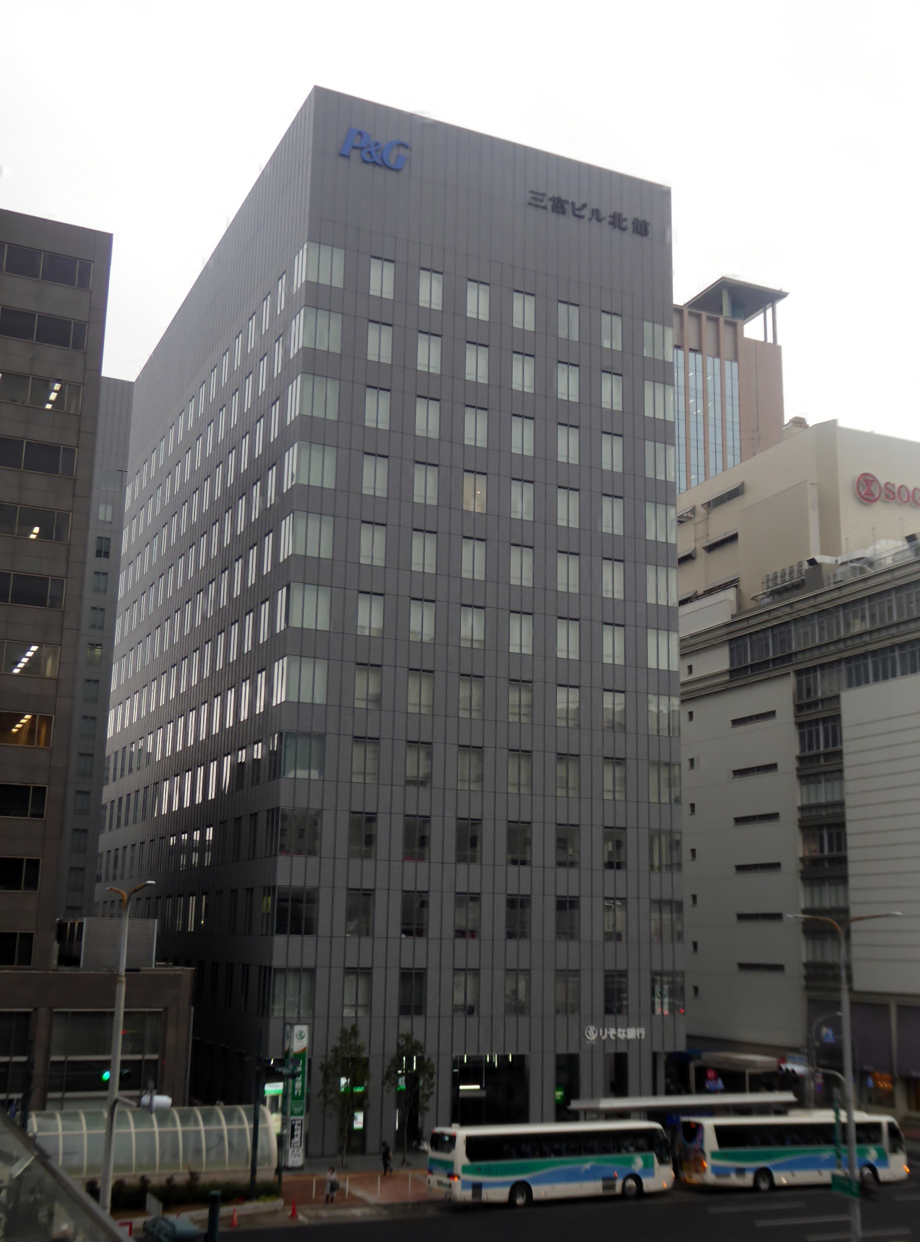 2016年11月19日時点の三宮ビル北館を撮影。